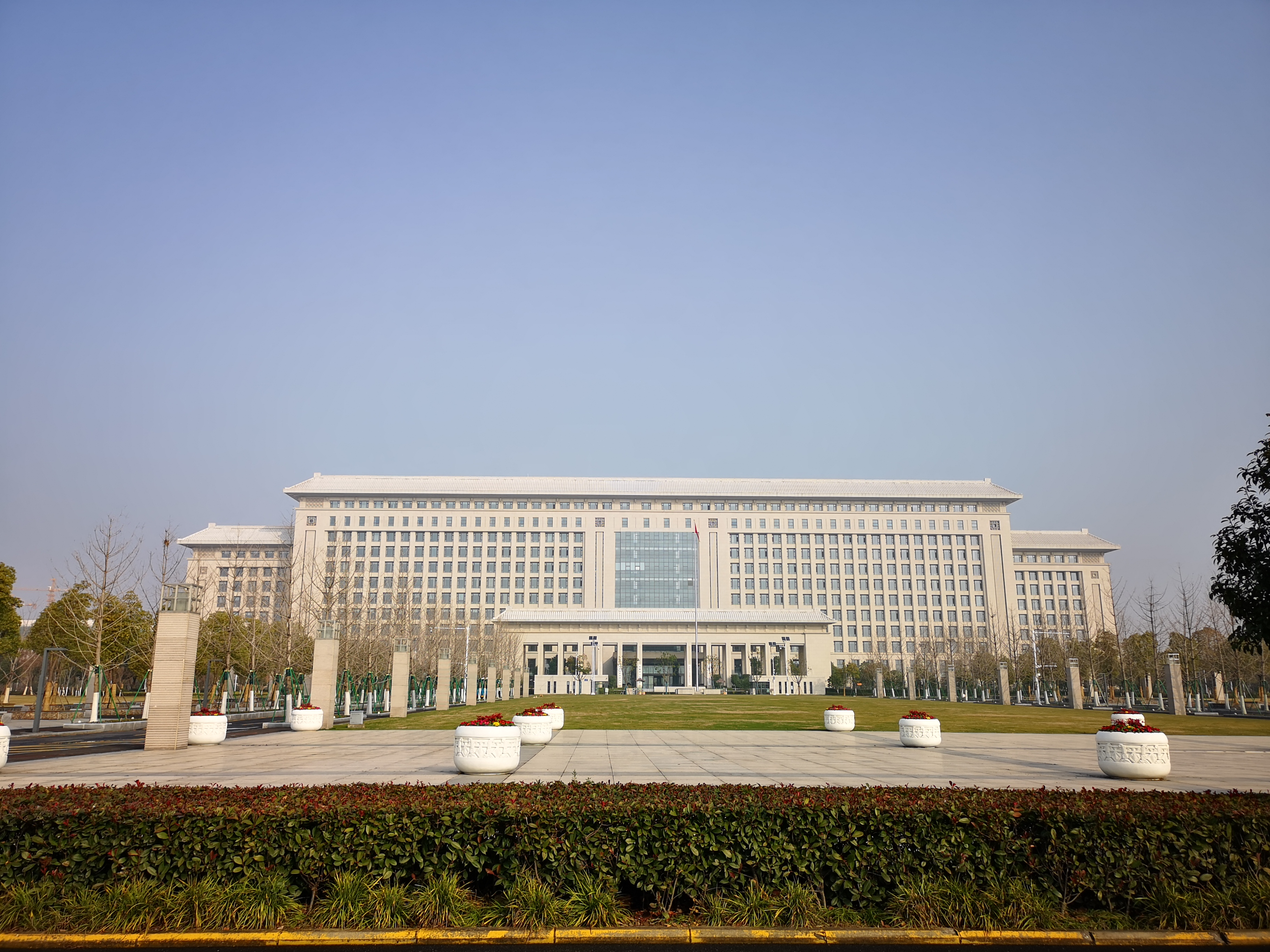 中文（中国大陆）: 安徽省行政中心（滨湖中心）